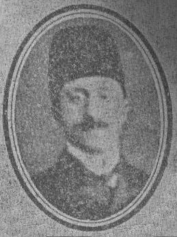 حسینقلی نواب وزیر امور خارجهٔ ایران در جوانی